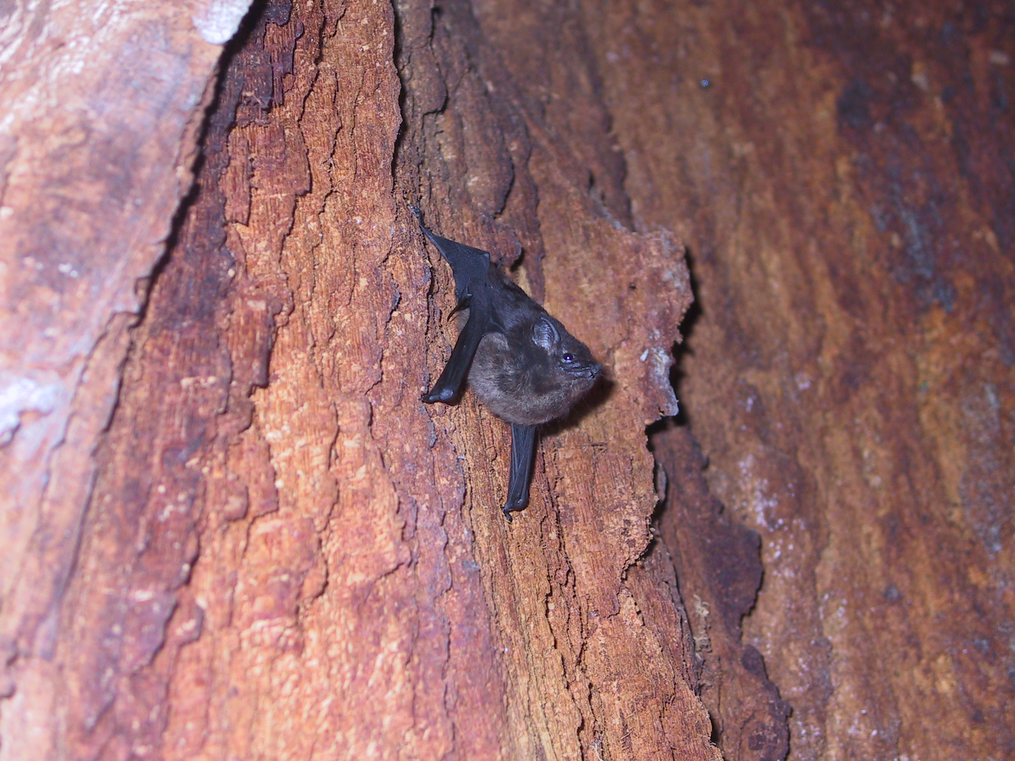 Saccopteryx bilineata, Costa Rica, Parque Nacional Cabo Blanco